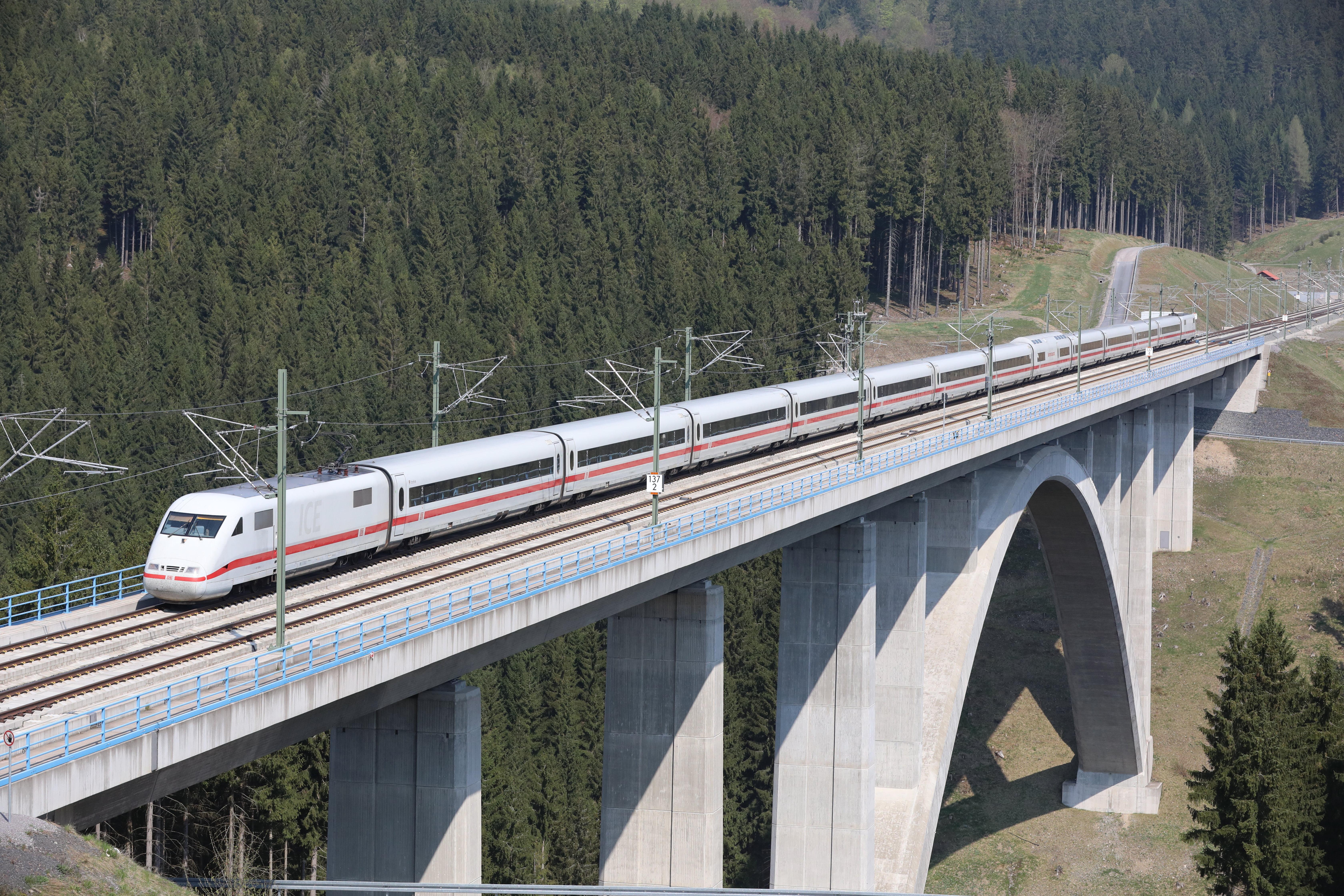 Massetalbrücke